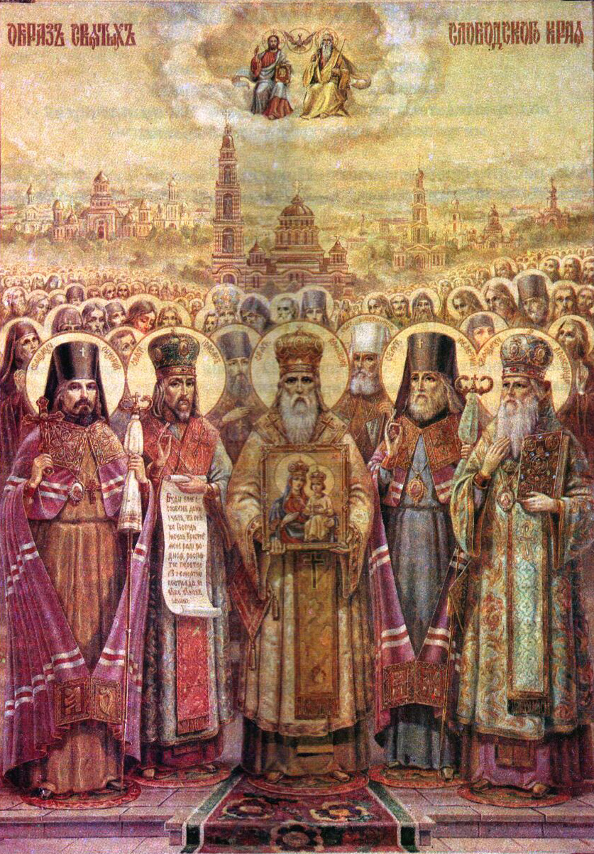 Икона "Святые Слободского края". В центре Патриарх Цареградский Афанасий (Пателларий), слева от него Иоасаф Белгородский (Горленко), справа - Мелетий Харьковский (Леонтович).